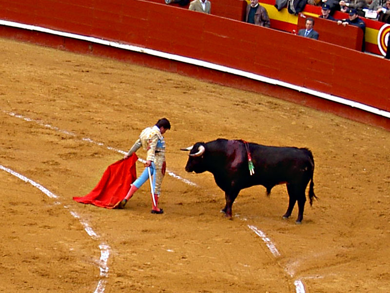 La bestia, Enriqueto, de 700 Kg.